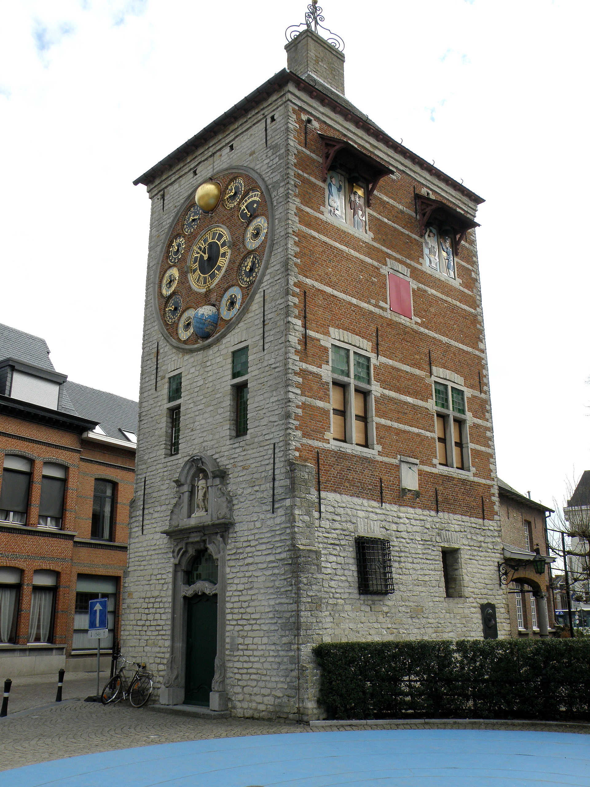 Zimmertoren te Lier (België).